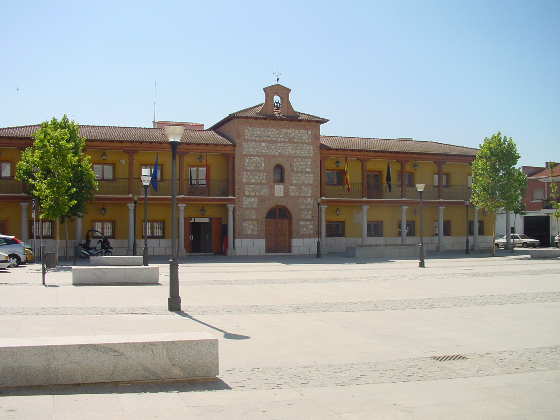 Ayuntamiento de San Martín de la Vega.